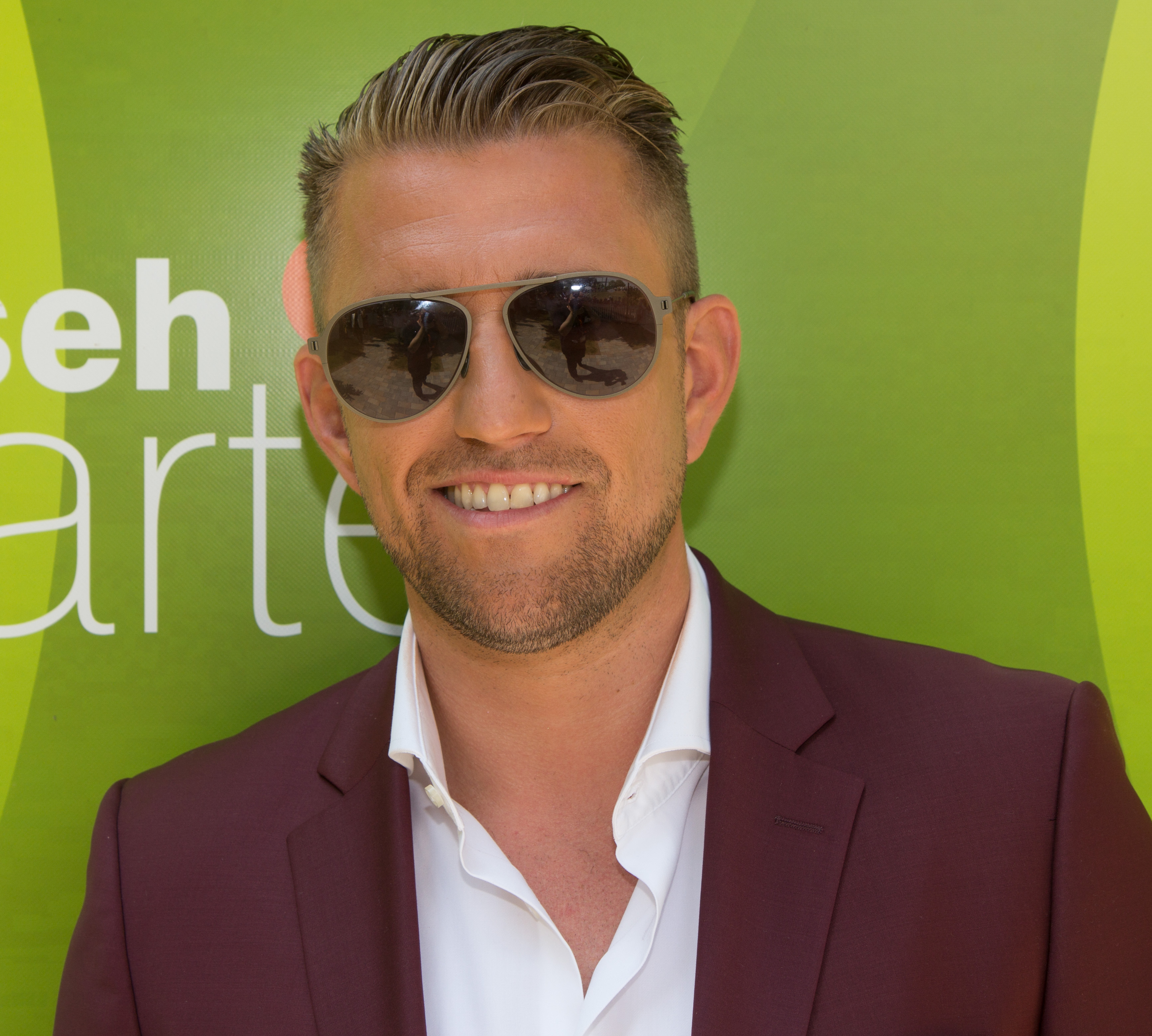 Christopher Bree als Gast beim ZDF-Fernsehgarten am 15. Juli 2018 in Mainz.